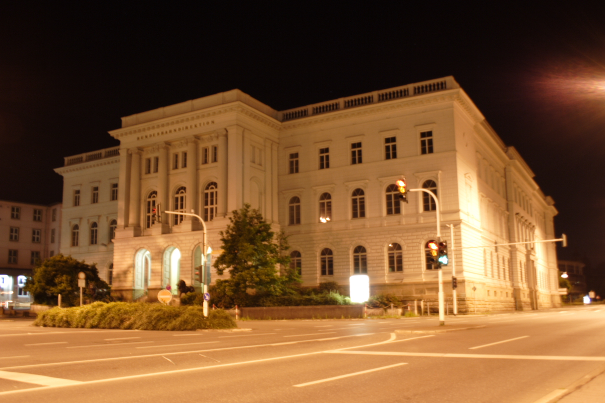 Das Gebäude der Bundesbahndirektion in Wuppertal